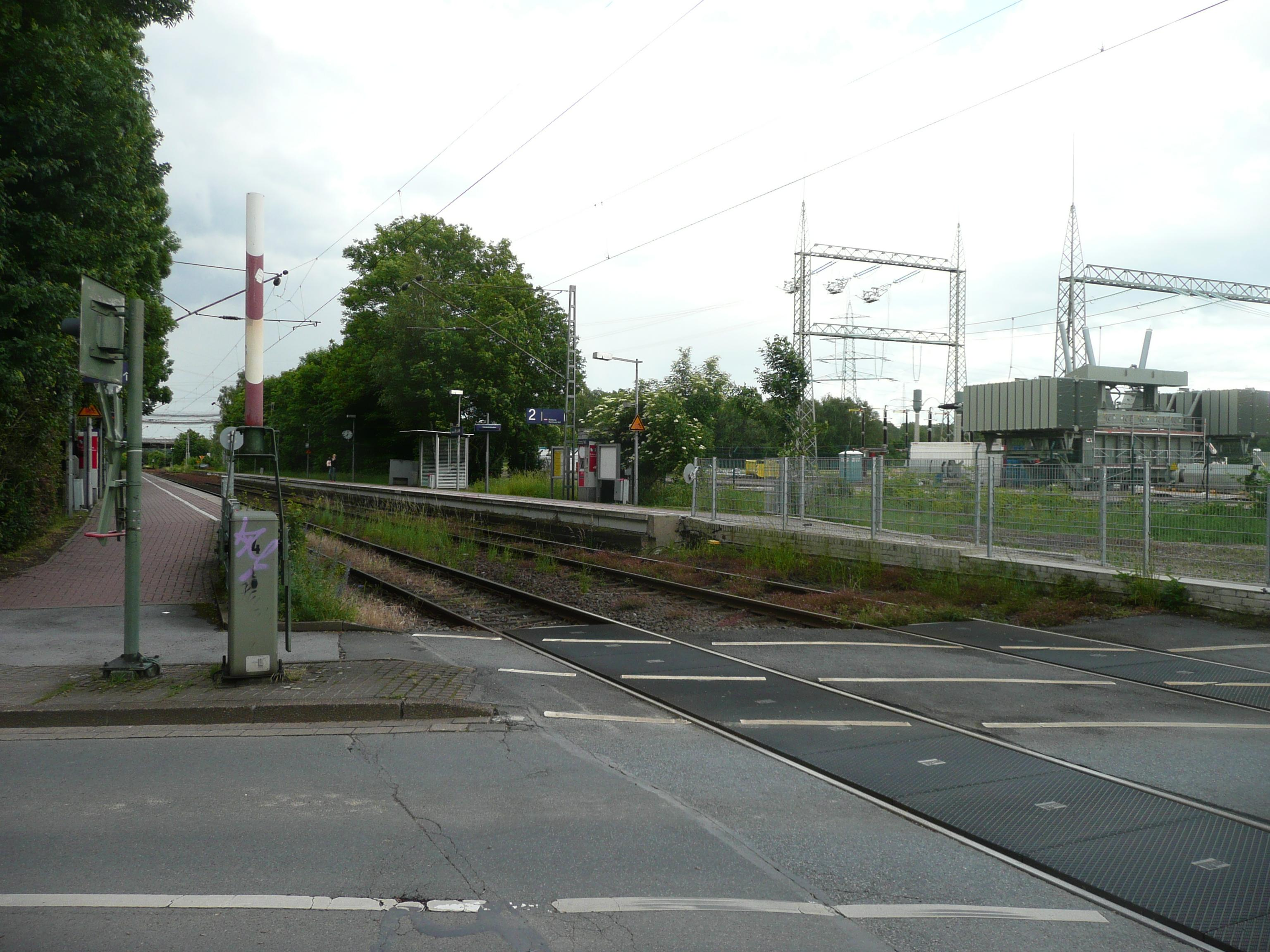 S-Bahnhof Dortmund-Kruckel, rechts Umspannwerk Kruckel